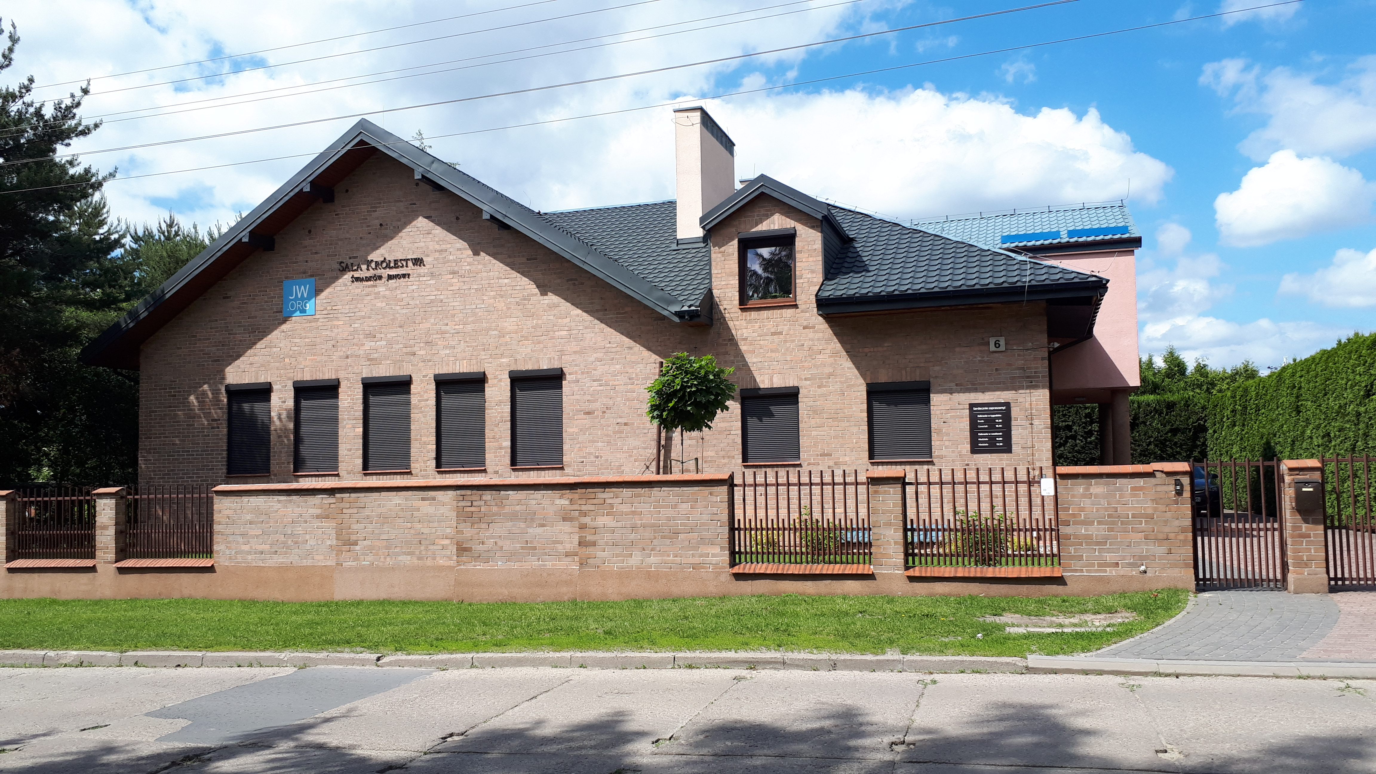 Sala Królestwa Świadków Jehowy. ul. Górnicza 6, Łódź.